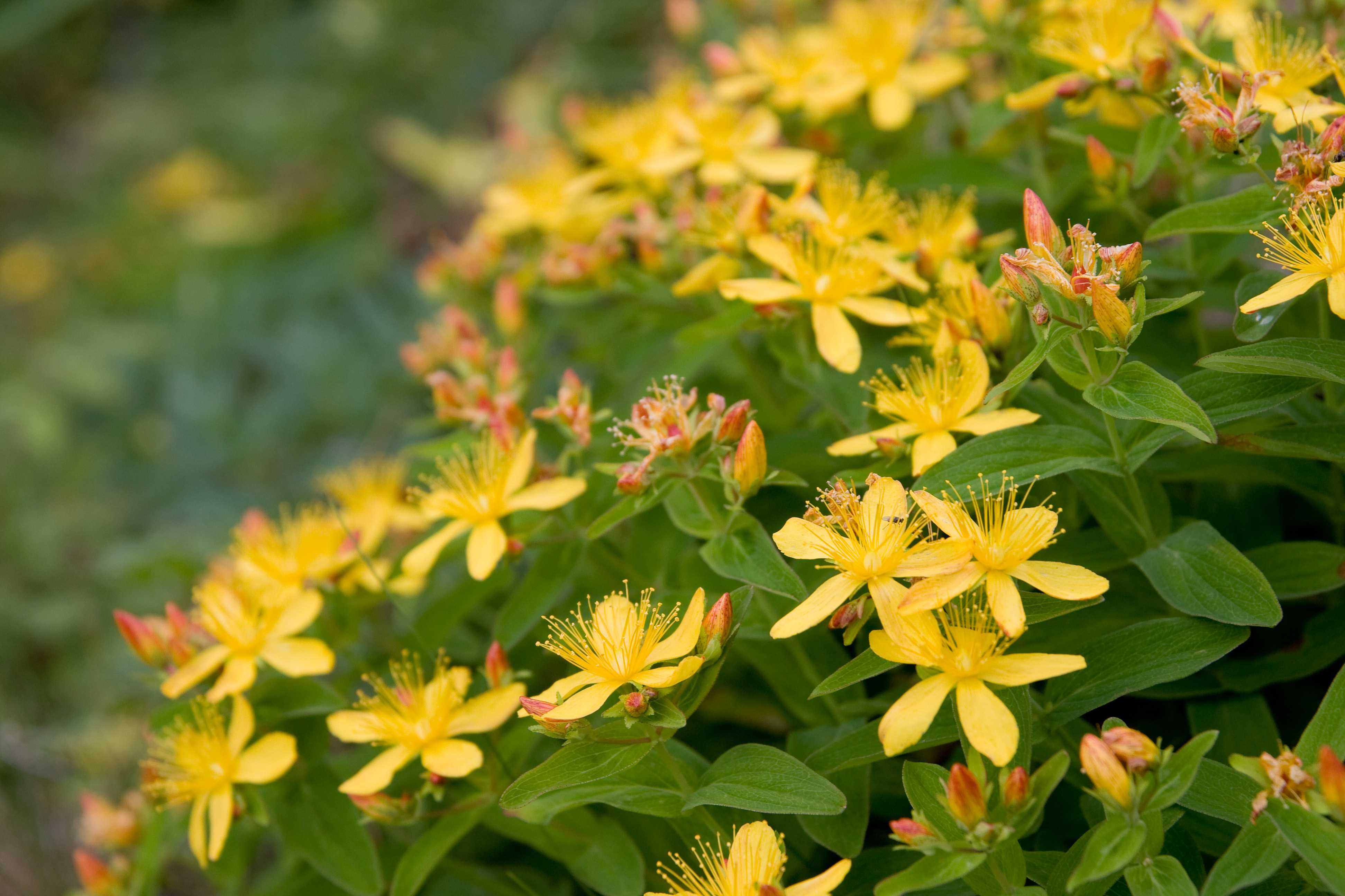 シナノオトギリ (学名:Hypericum kamtschaticum var. senanense)